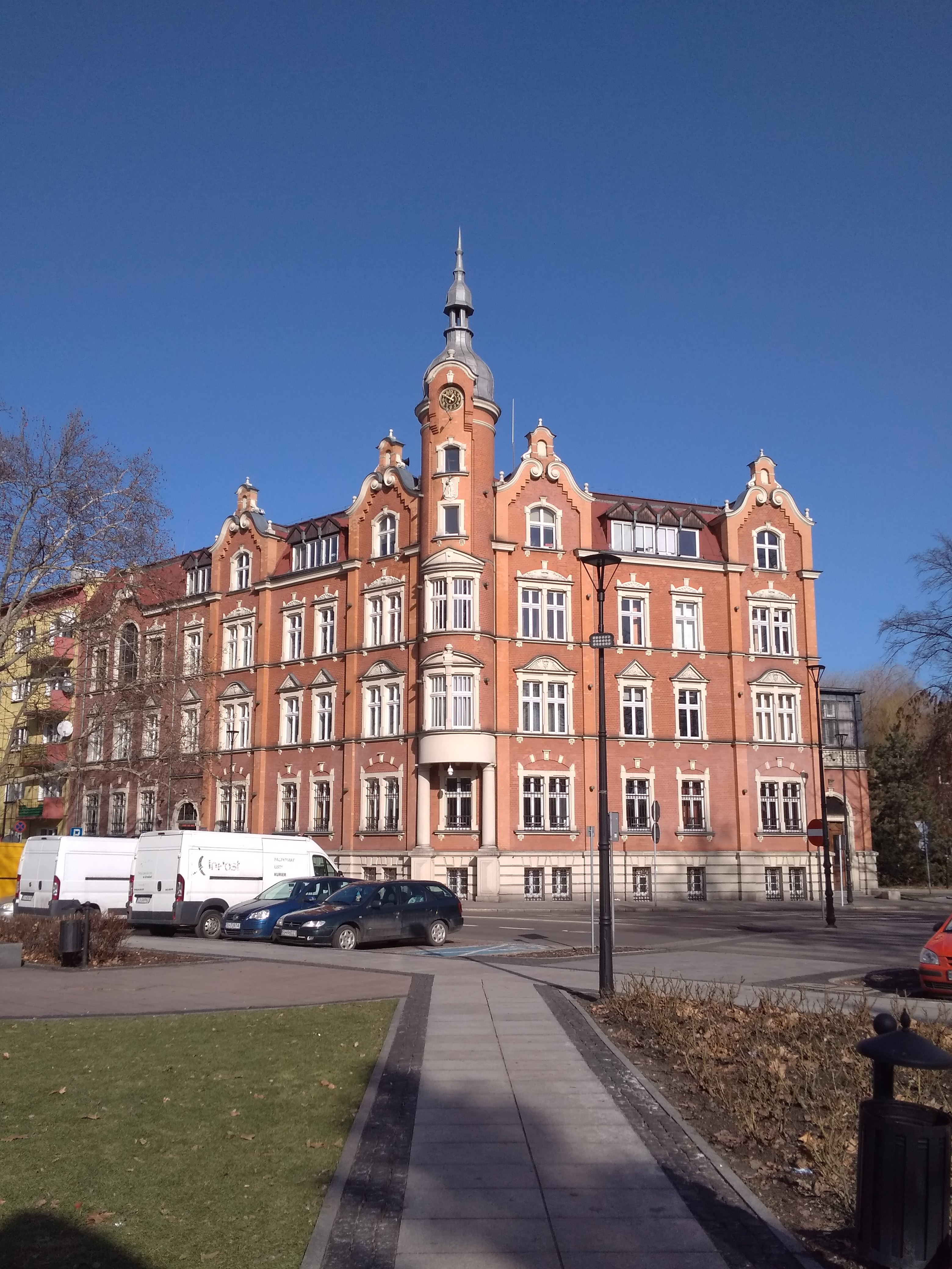 Ratusz w Siemianowicach Śląskich, luty 2019